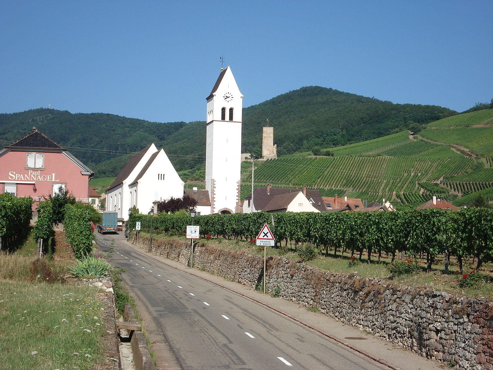 Katzenthal, Haut-Rhin, Alsace, France. Au second plan, à droite du clocher, château ruiné du Wineck. Au sommet de la montagne à droite, statue du Christ sur le Galtz.